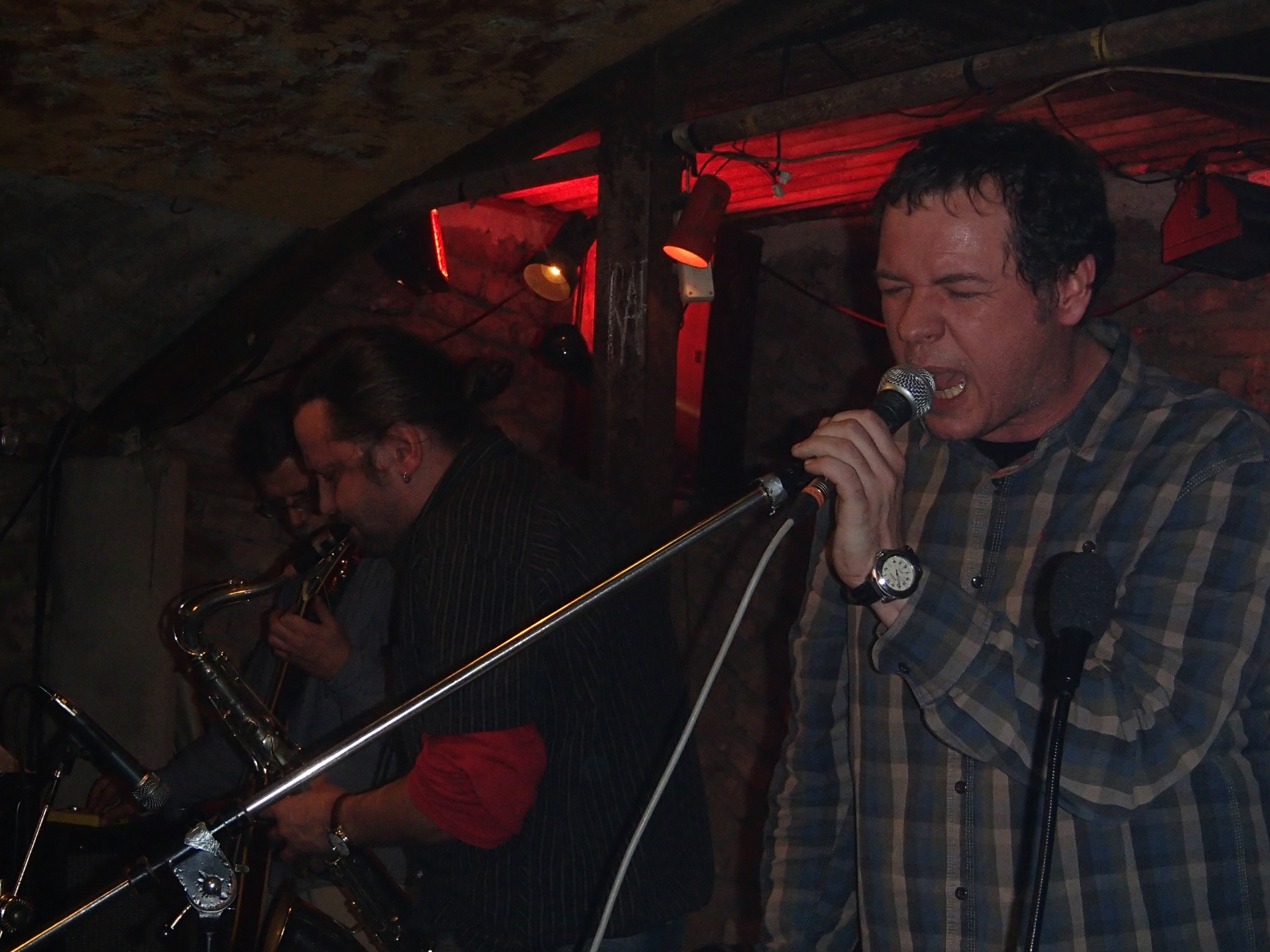 Sdružení rodičů a přátel RoPy na koncertě v Praze dne 21. 12. 2012